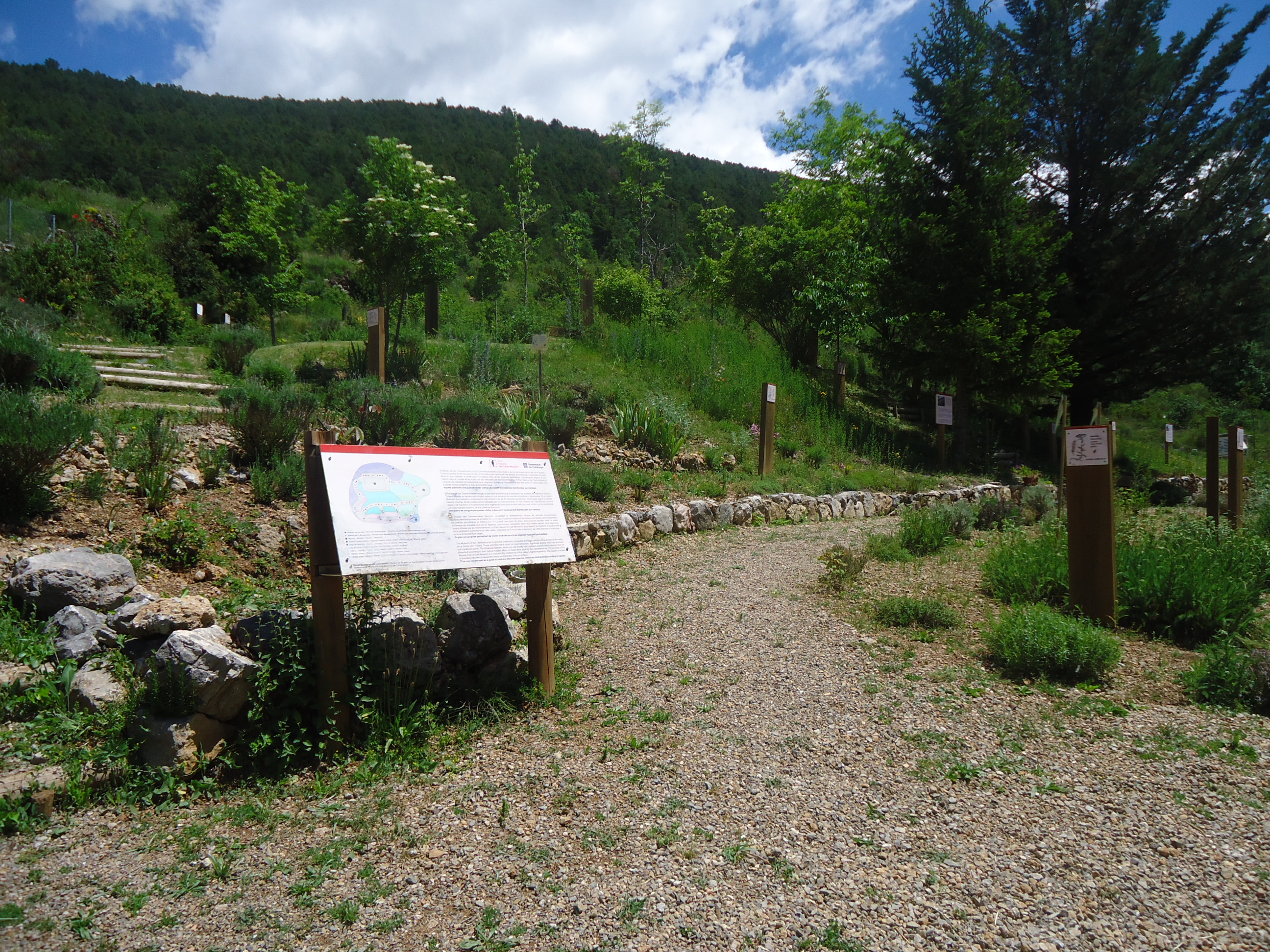 Jardí Botànic de les Trementinaires. Tuixent (Alt Urgell)